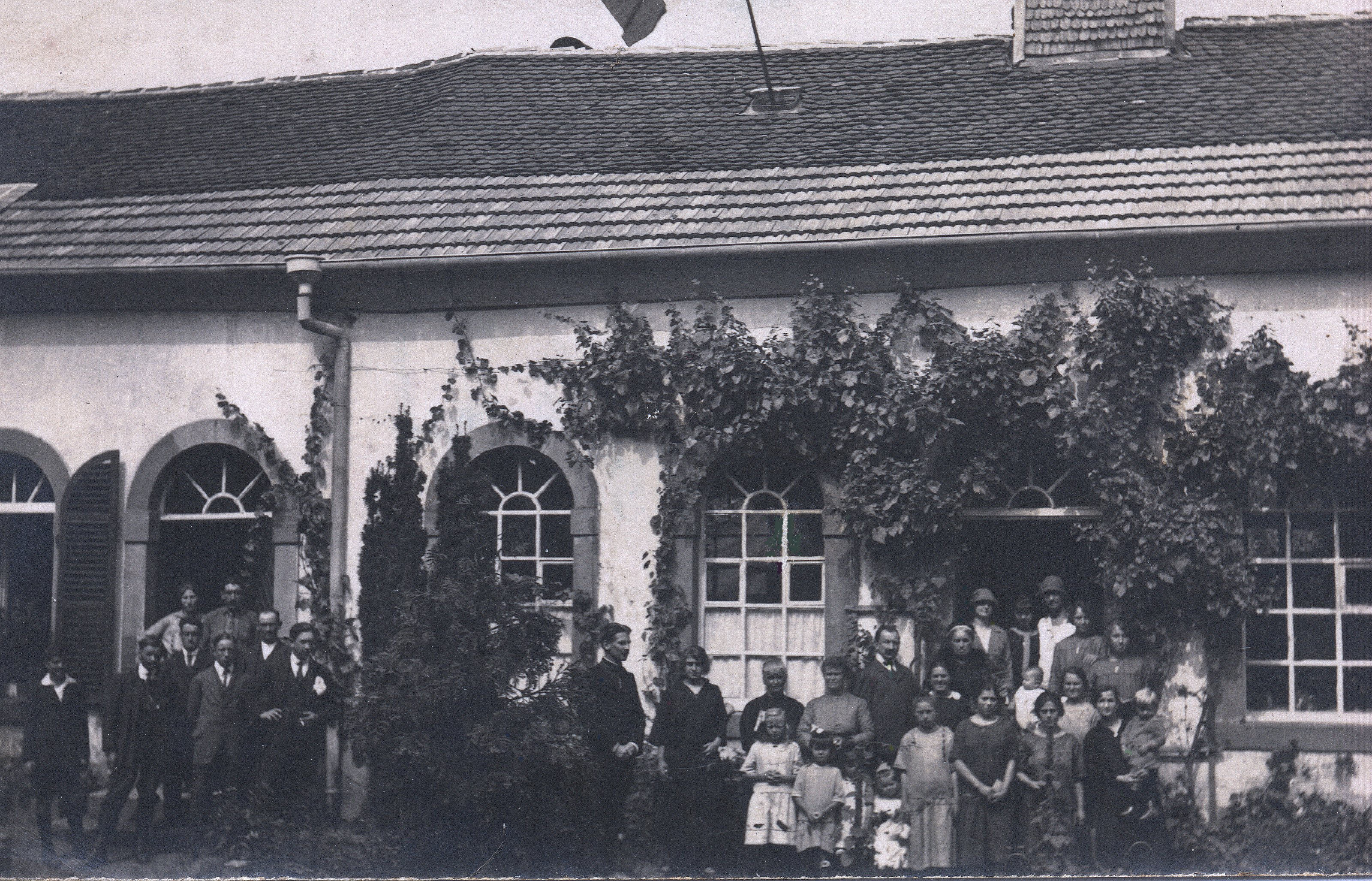 1925 : Sortie de culte avec le pasteur Kuntzel